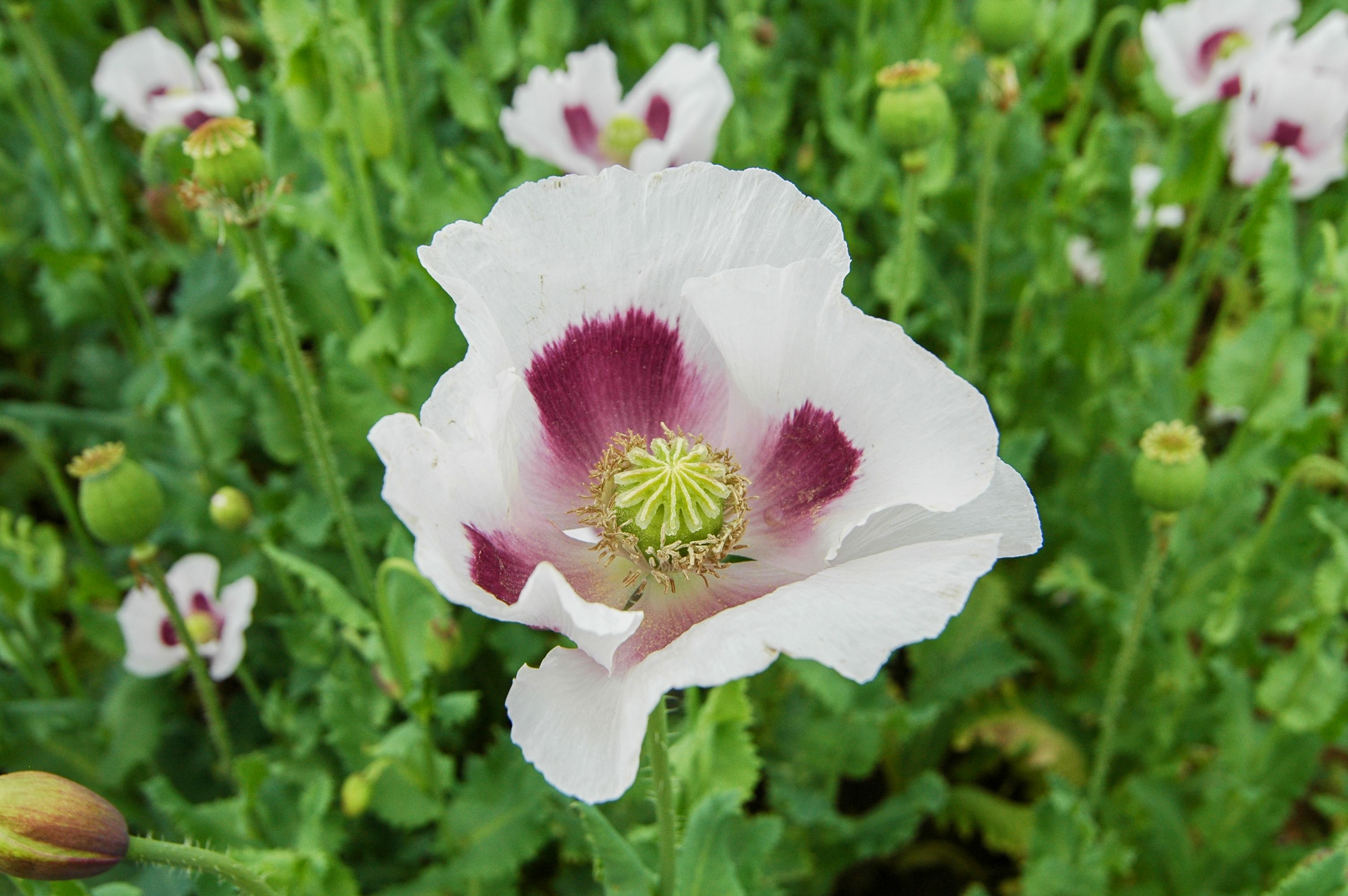 český modrý mák - detail květu bílekvetoucí odrůdy, Výzkumná stanice ČZU v Praze.